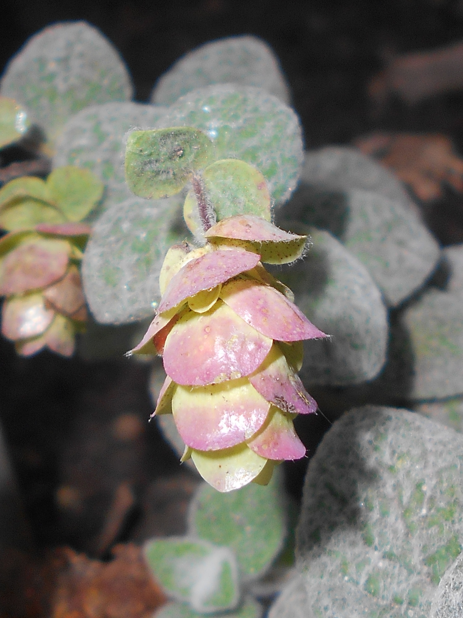 Lebiodka kreteńska (Origanum dictamnus), Ogród Botaniczny Uniwersytetu Wrocławskiego.